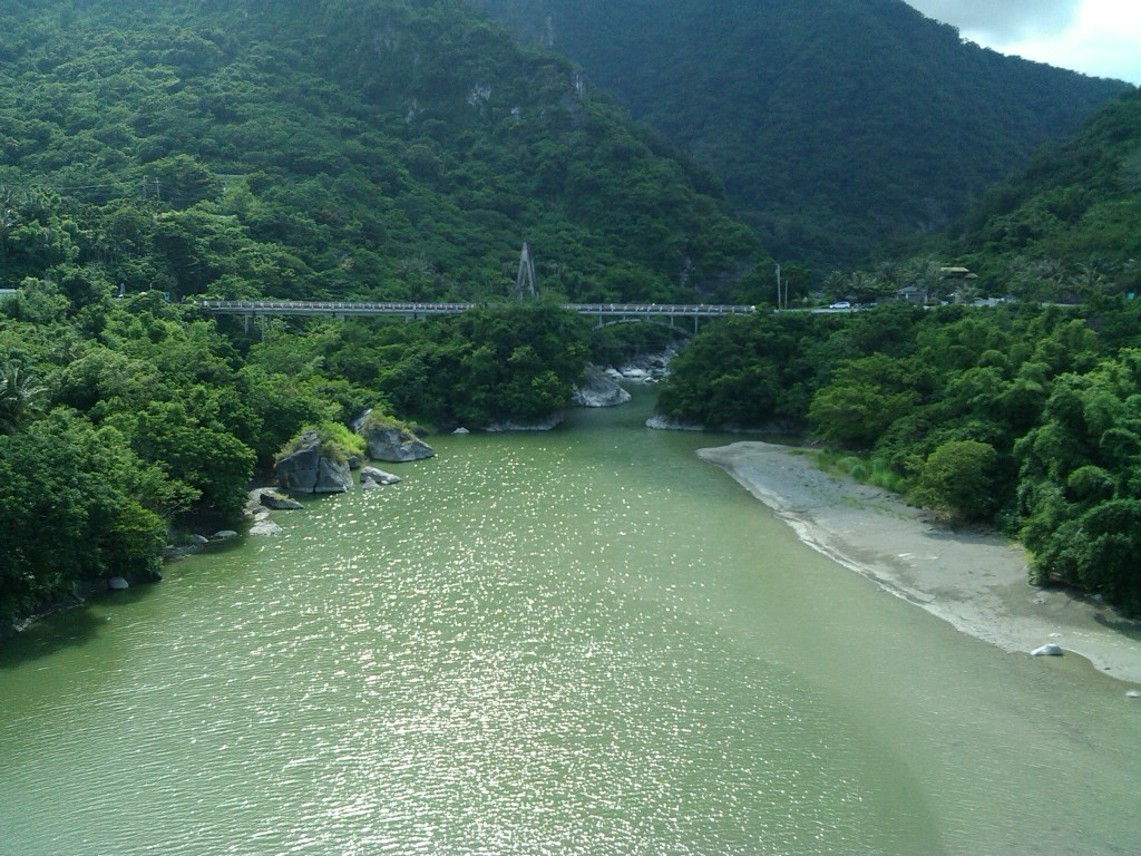 東河鄉與成功鎮交界的舊東河橋